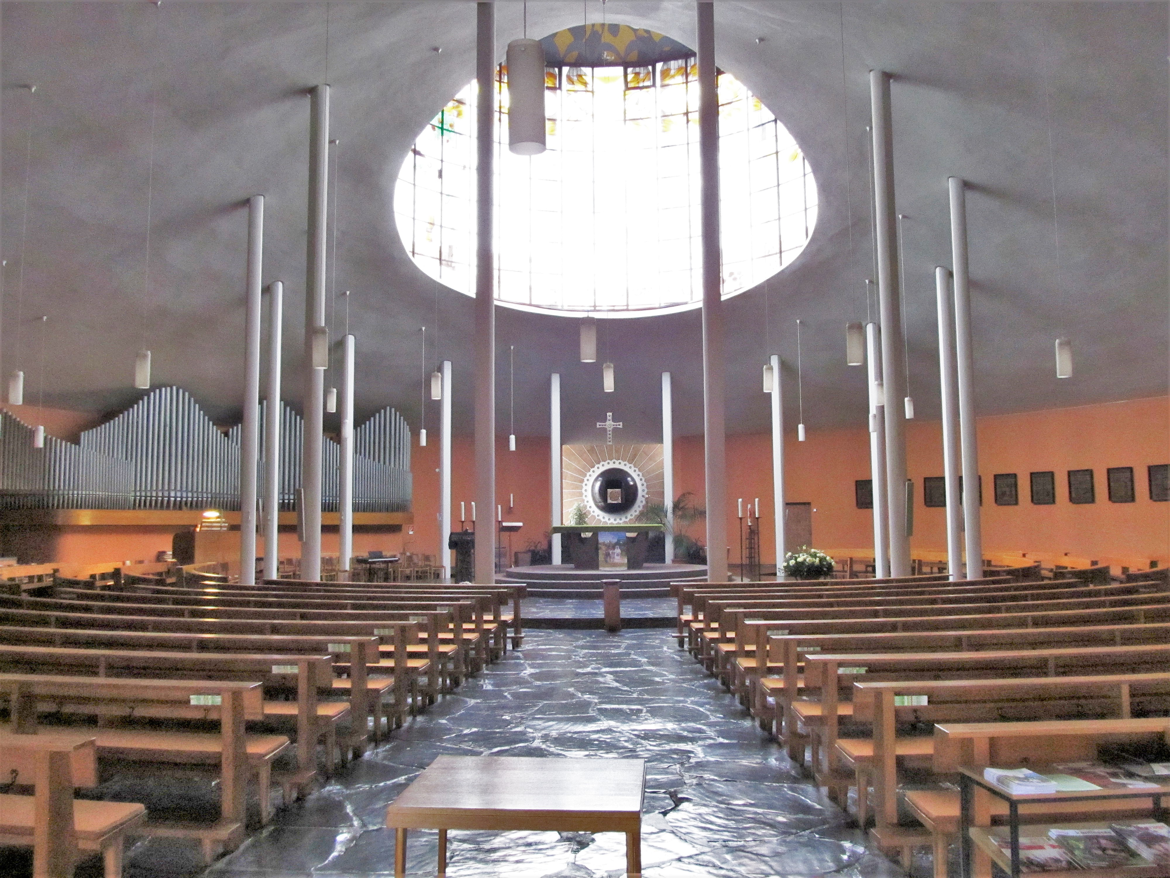 Blick ins Innere der katholischen Pfarrkirche St. Albert in Saarbrücken-Rodenhof, Saarland